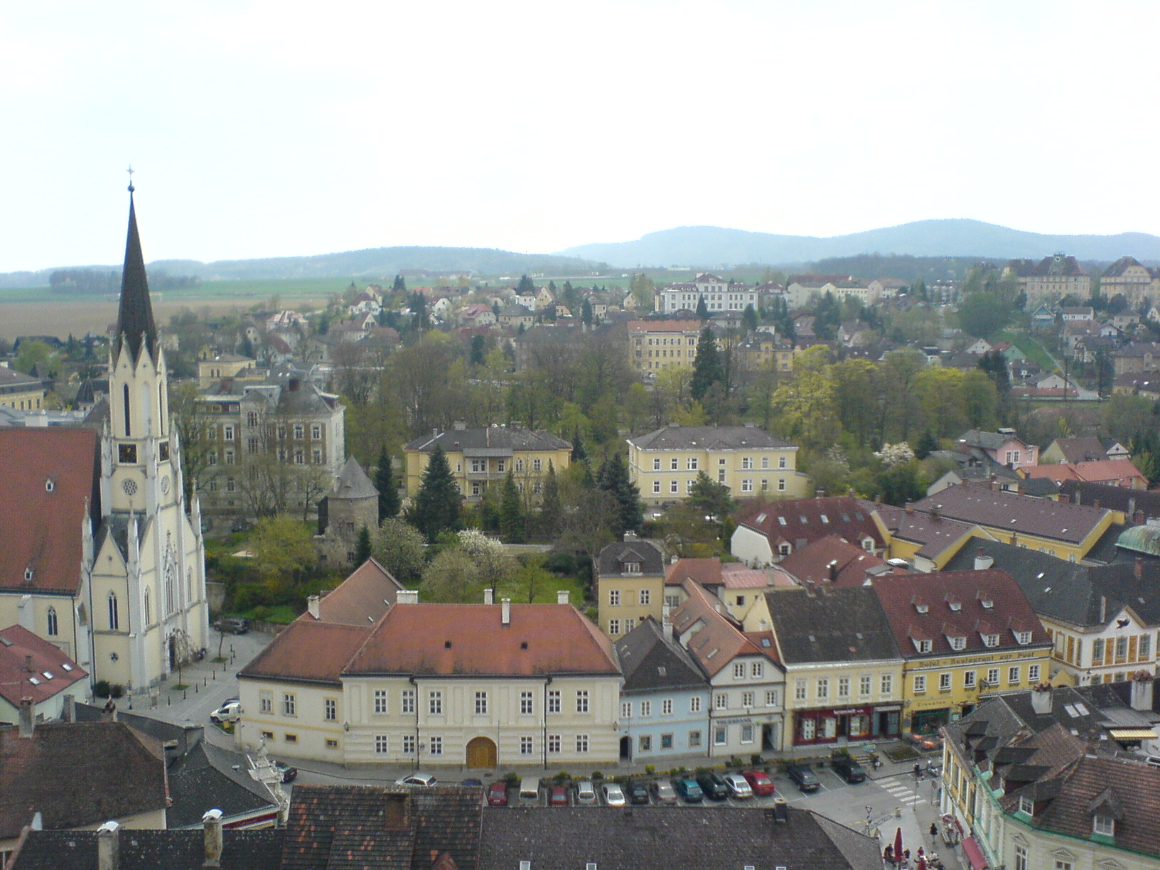 Blick auf Melk